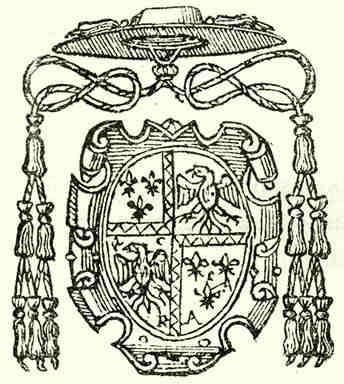 Estei Hipolit bíbornok czímere (544. l.) Ciacconius: «Historia Rom. Pontificum» cz. művéből.